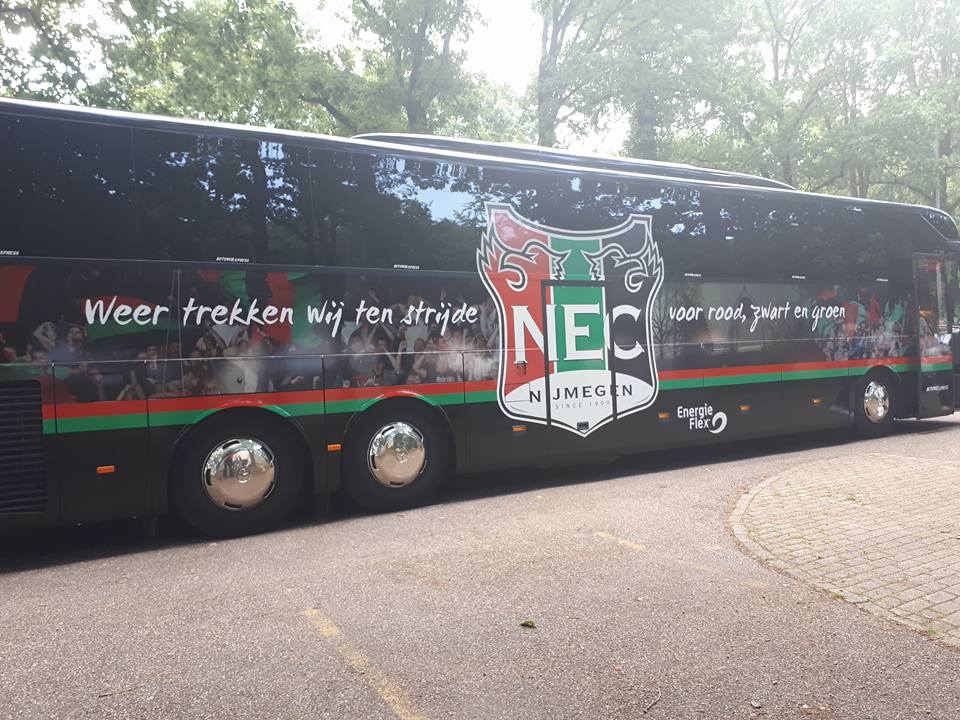 Spelersbus tijdens de open dag.